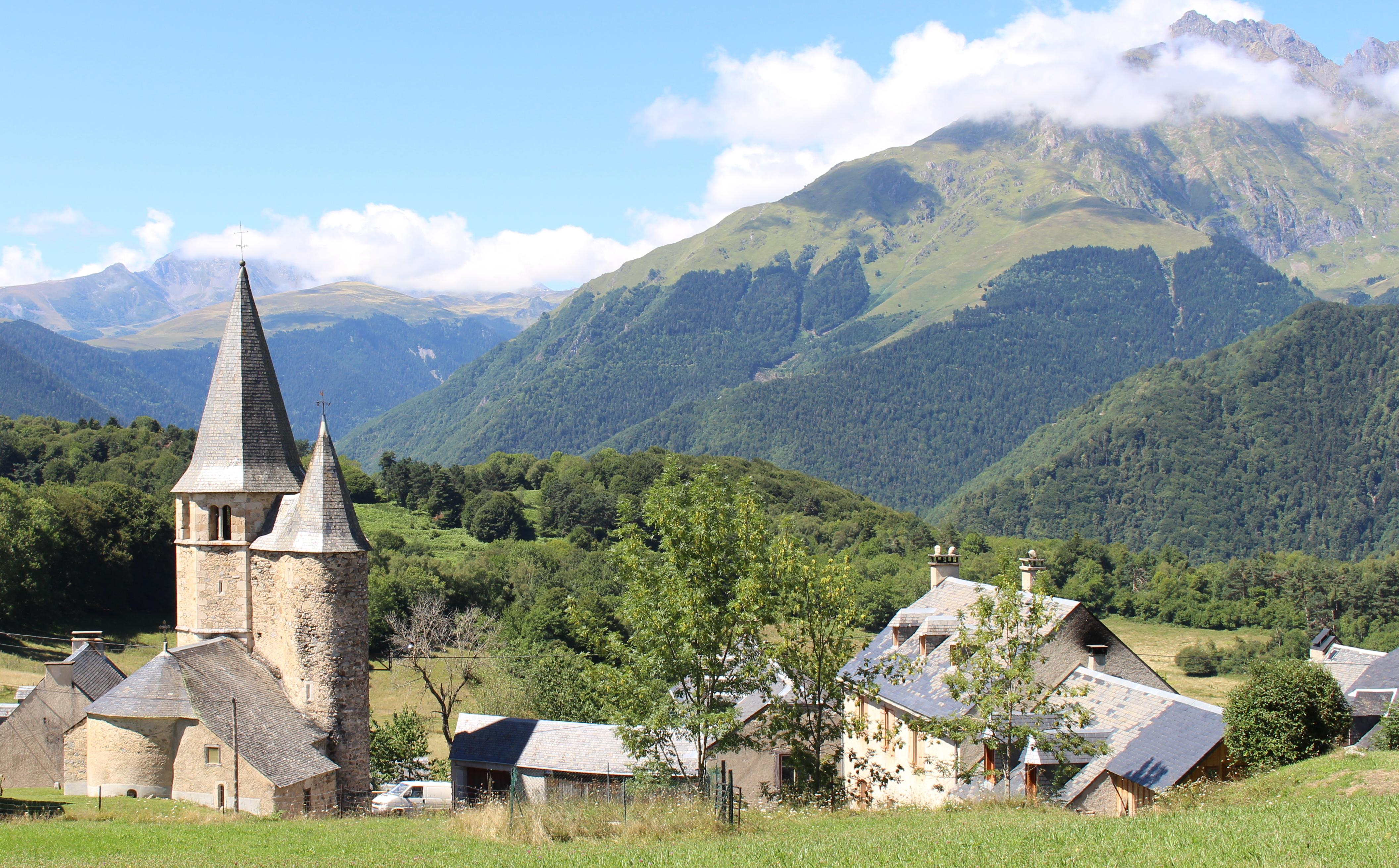 Église Sainte-Eulalie de Lançon (Hautes-Pyrénées)